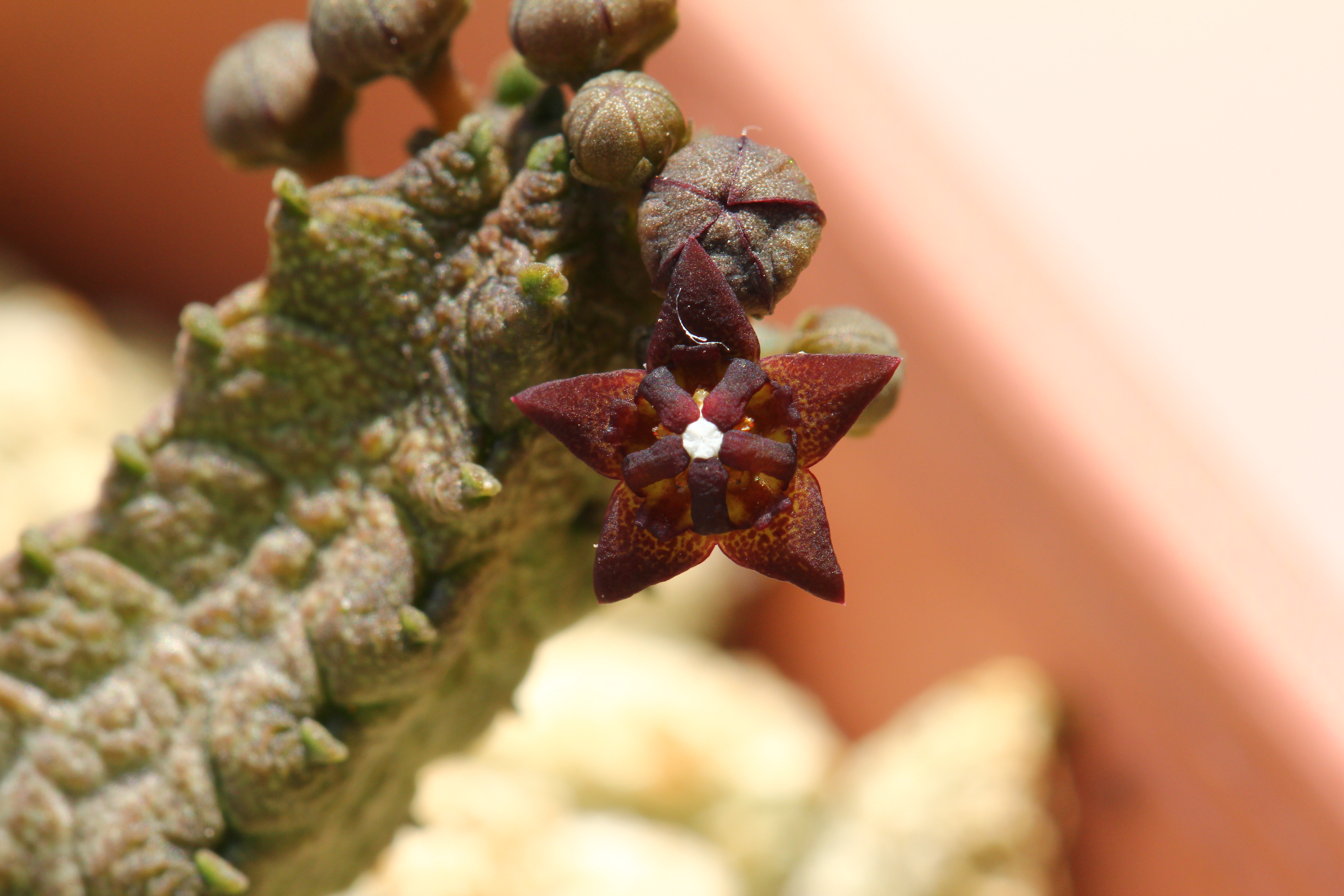 凝蹄玉属。